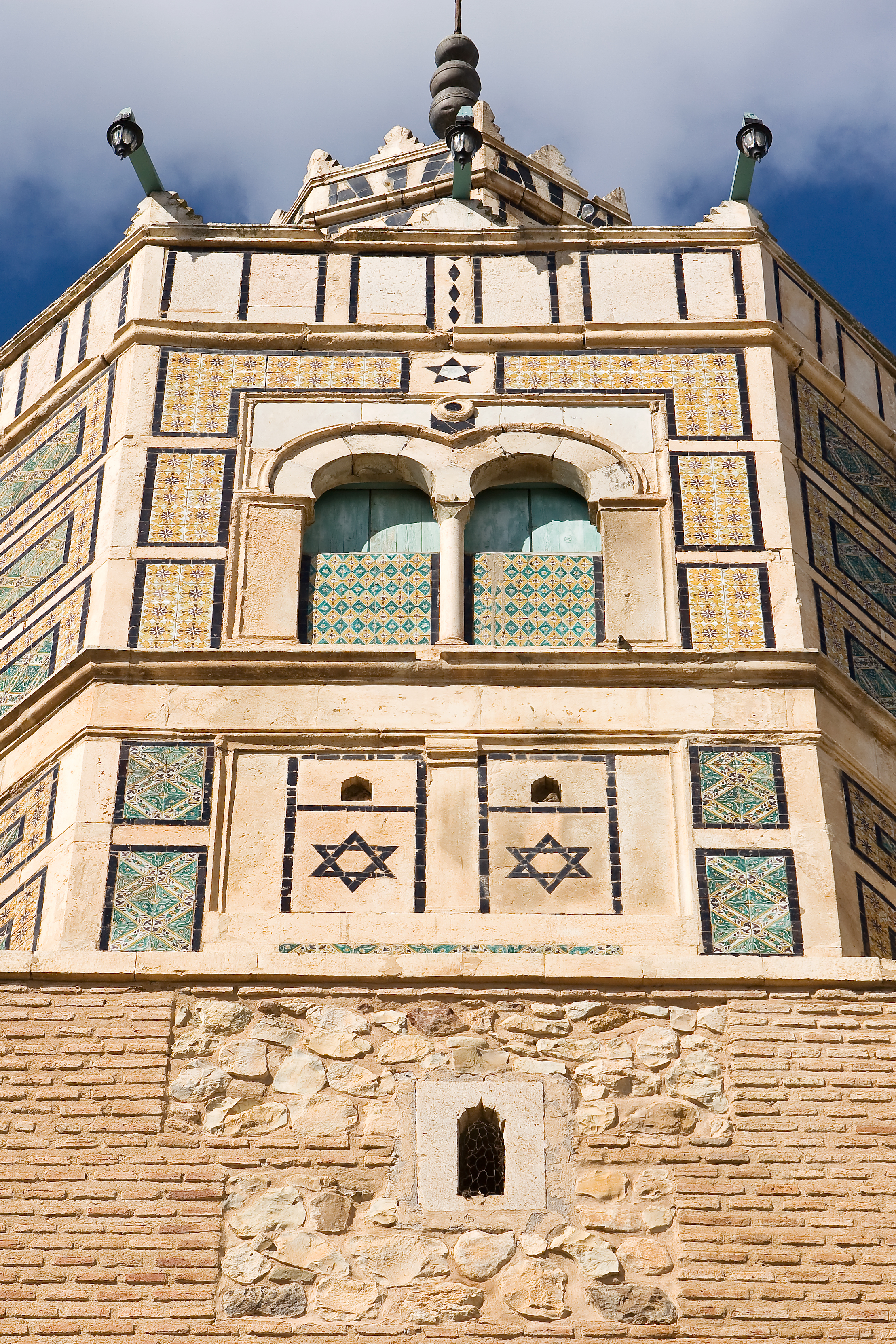 Grande mosquée, Testour